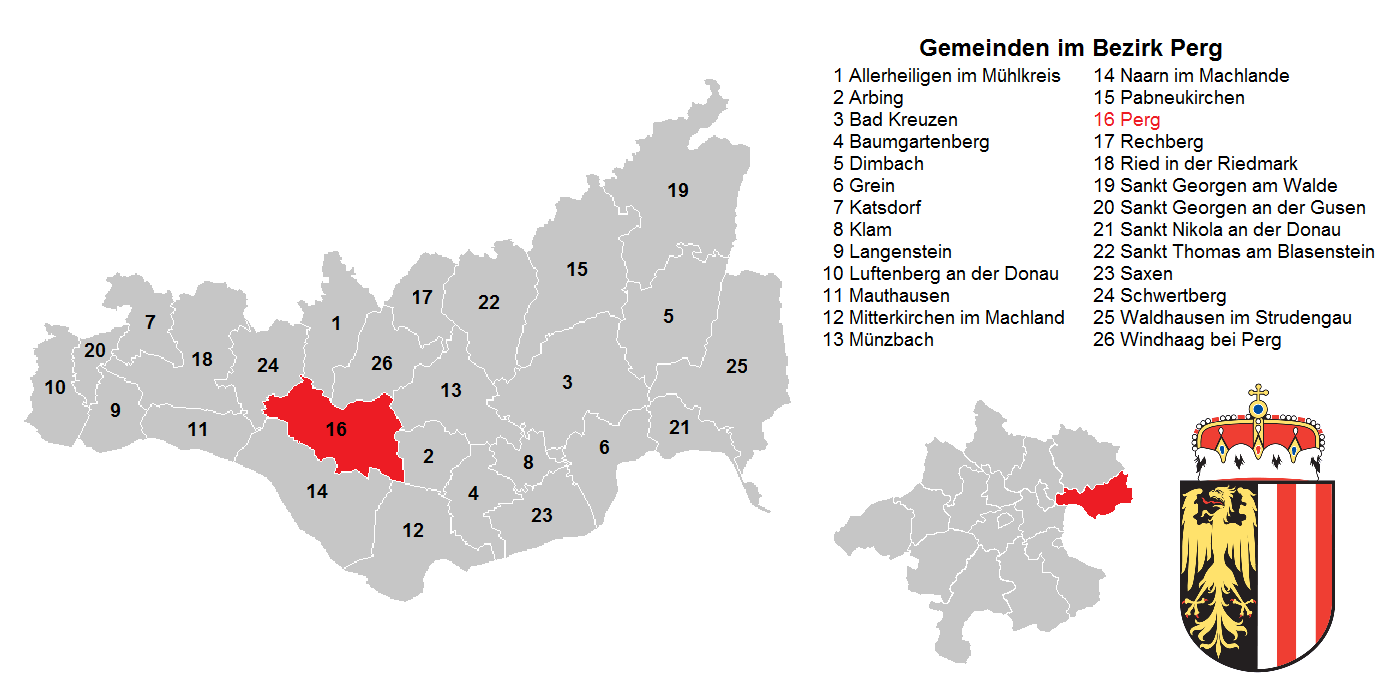 Bezirk Perg